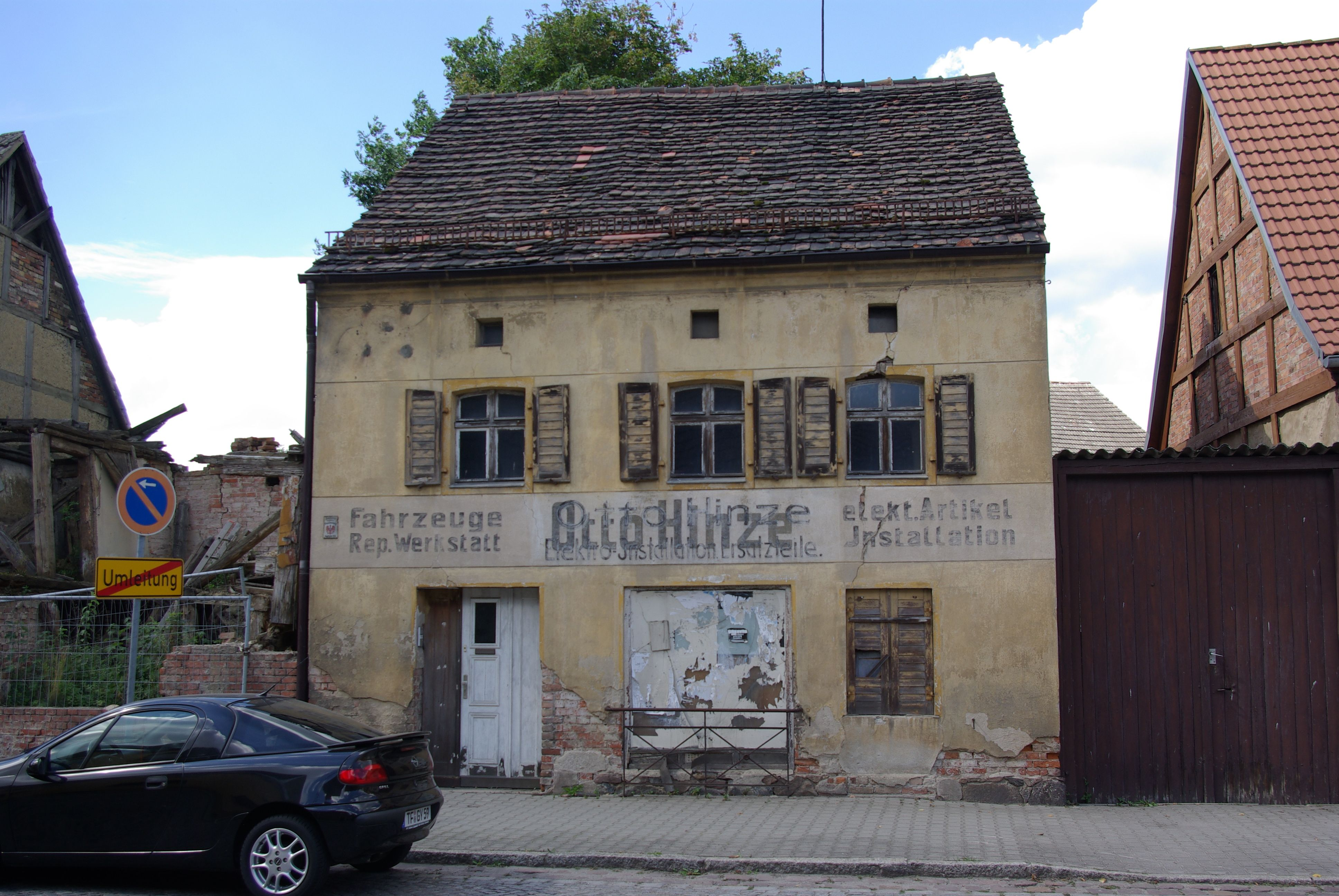 Jüterbog in Brandenburg. Das Haus in der Dennewitzer Straße 20 steht unter Denkmalschutz. Das Haus ist ein Fachwerkhaus und ist in der Mitte des 19. Jahrhundert entstanden.